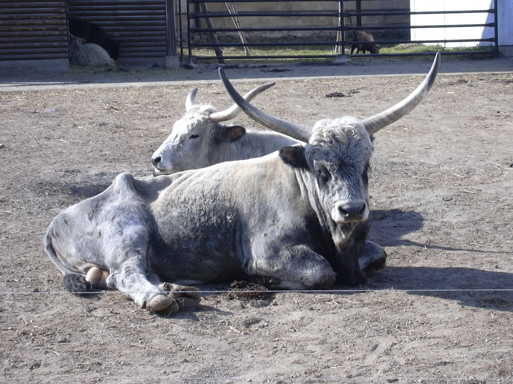 tur (zoo Vyškov- czech republic)